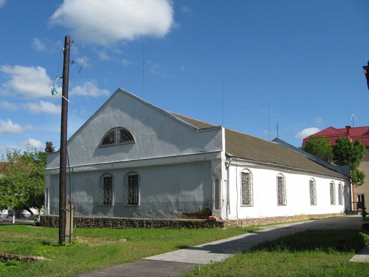 Капыль. Музей